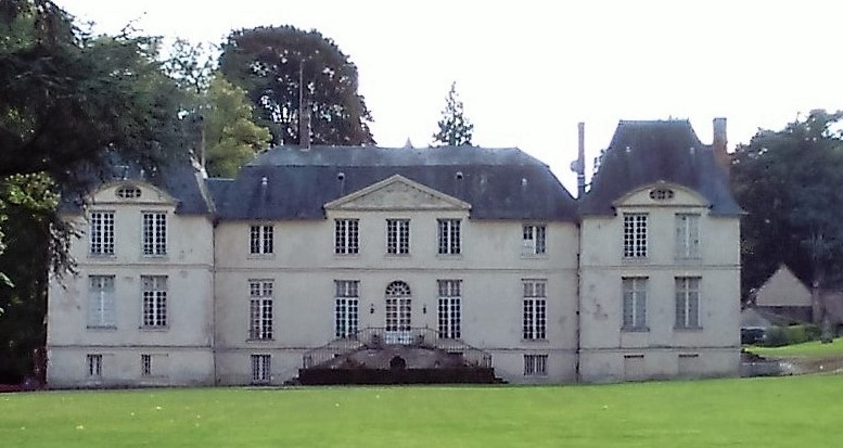 Vue rapprochée sur le château.